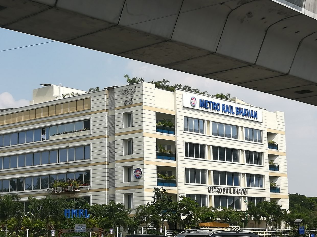 Hyderabad Metro Rail Bhavan,Rasoolpura,Begumpet, Hyderabad